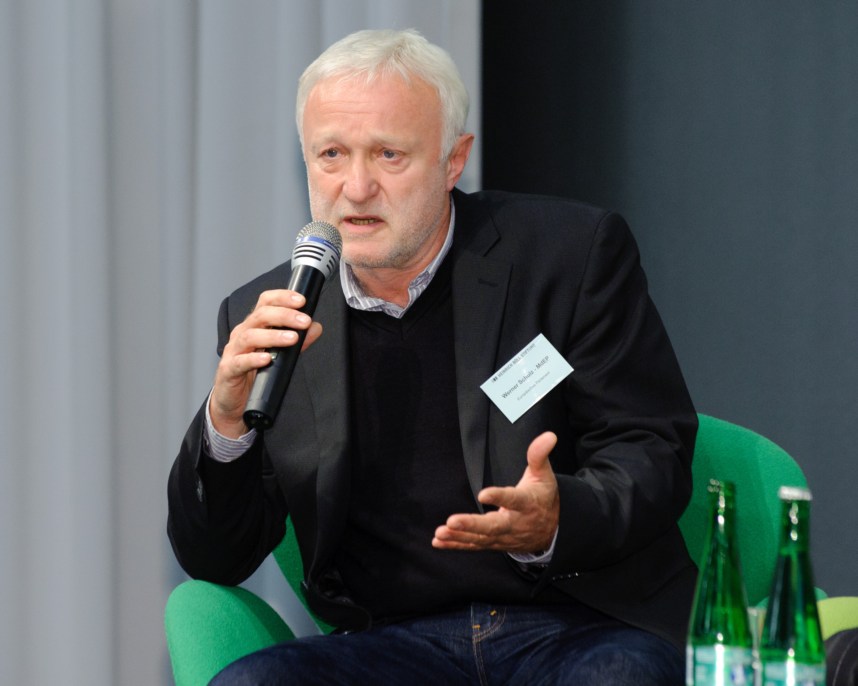 Werner Schulz (Mitglied des Europäischen Parlaments - Die Grünen/EFA, Brüssel) Foto: CC-BY-SA Stephan Röhl /